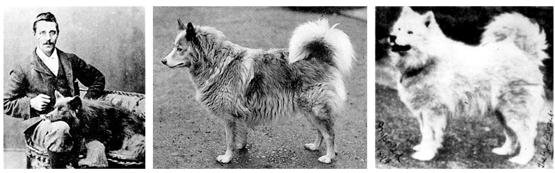 Слева направо: Эрнст Килбрун Скотт и Собака (Sabarka), Whitey Petchora, Musti.